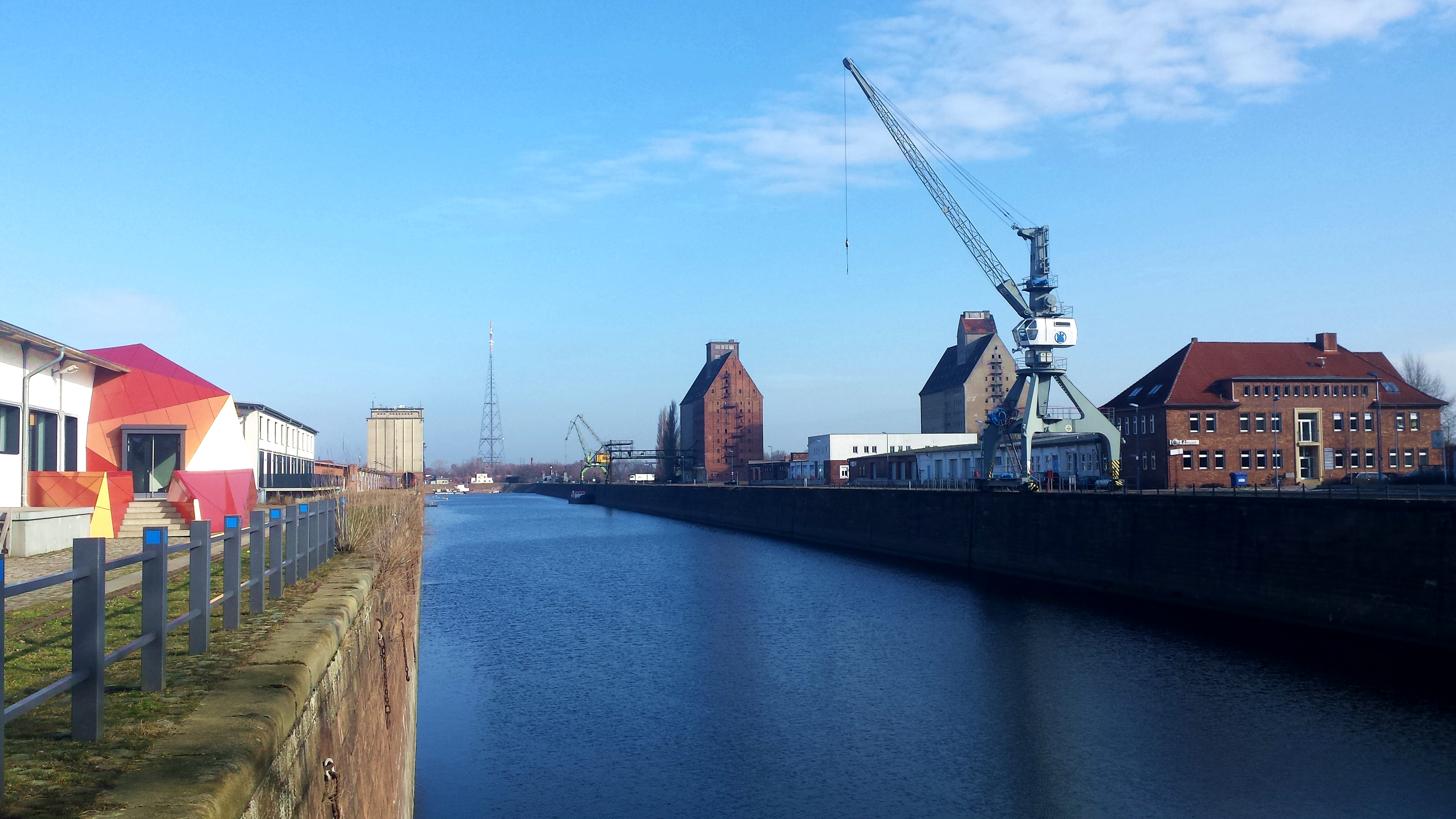 Hafenbecken des Wissenschaftshafen Magdeburg, links die IBL GmbH, rechts Drehkräne